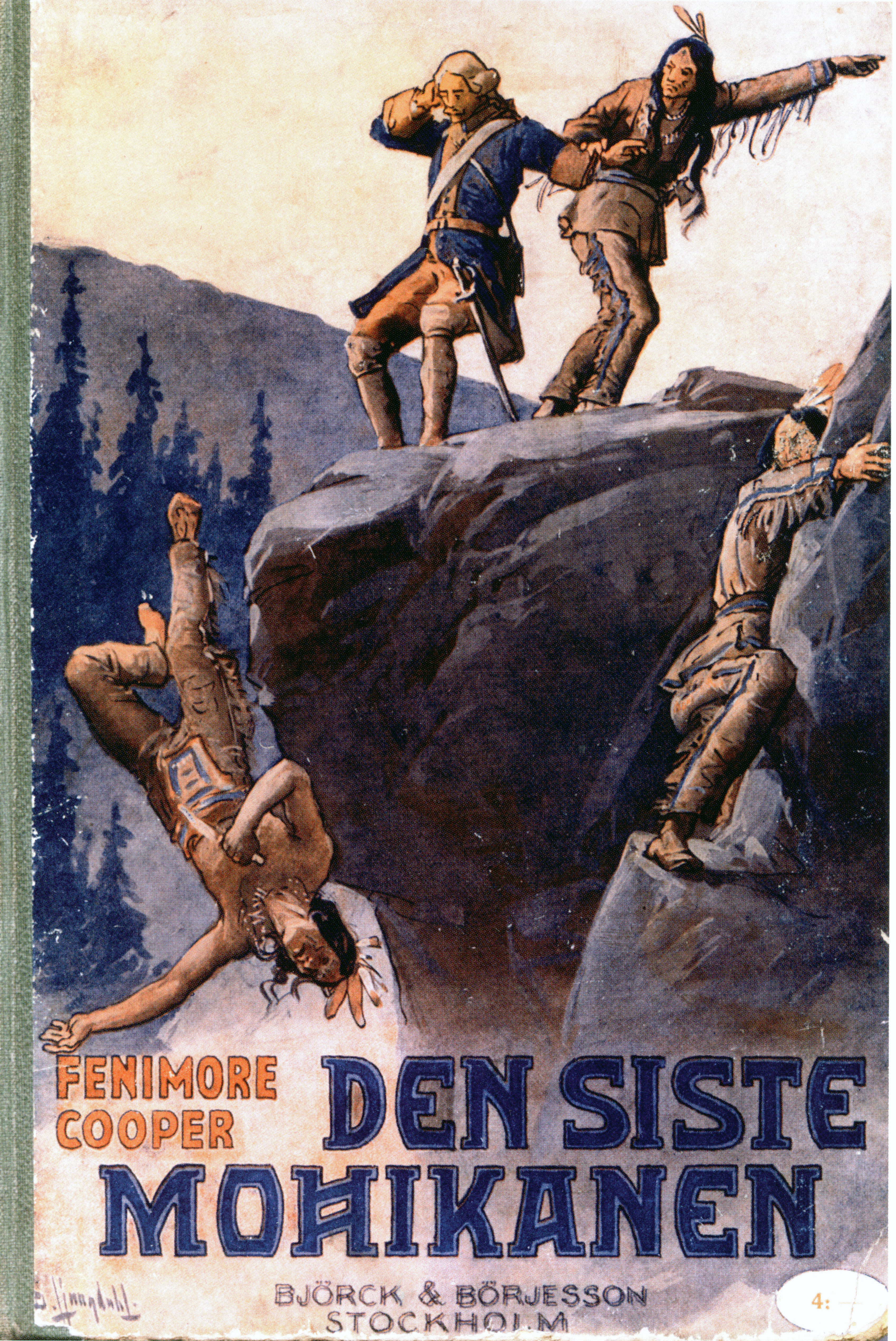 Book cover by David Ljungdahl (1870-1940): Den siste mohikanen